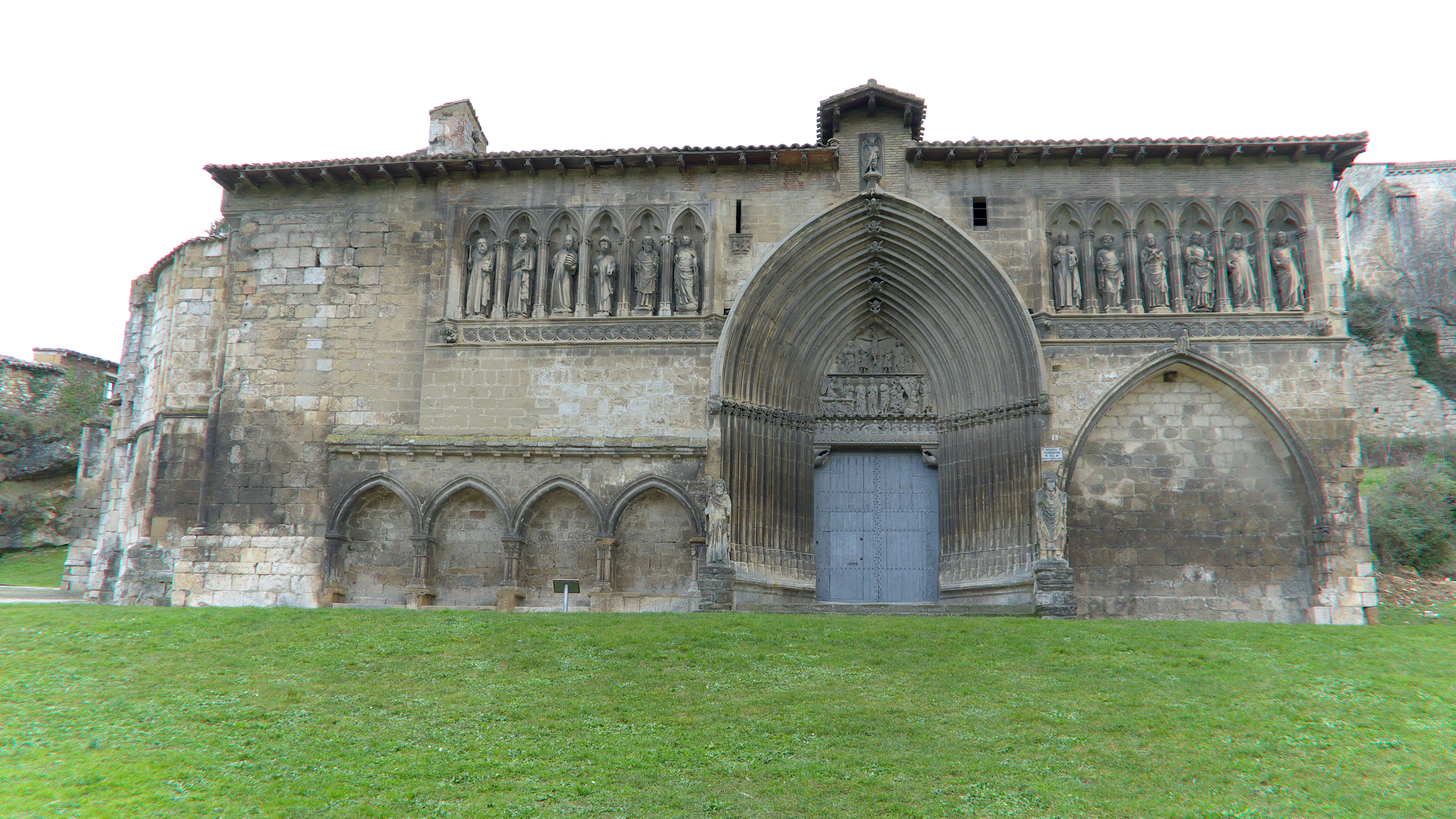 La Cofradía del Santo Sepulcro tenía su sede en esta iglesia (1123)